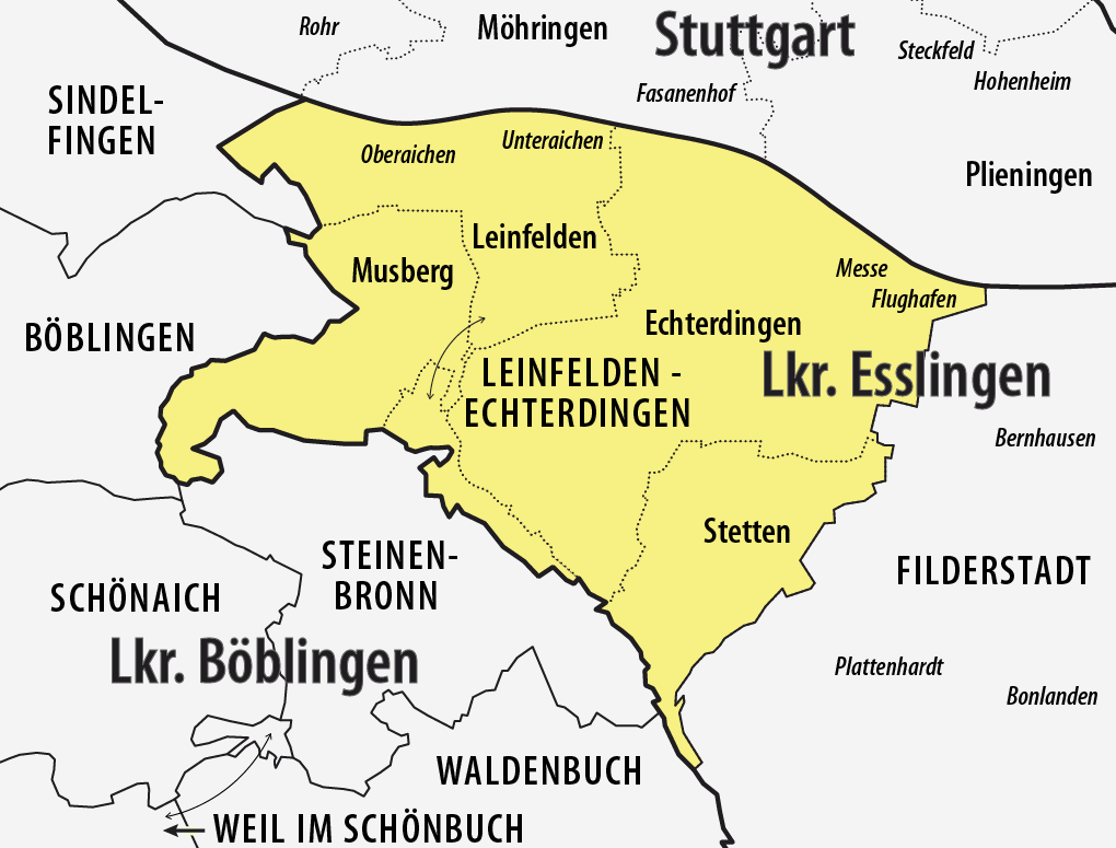 Plan der Stadtteile von Leinfelden-Echterdingen